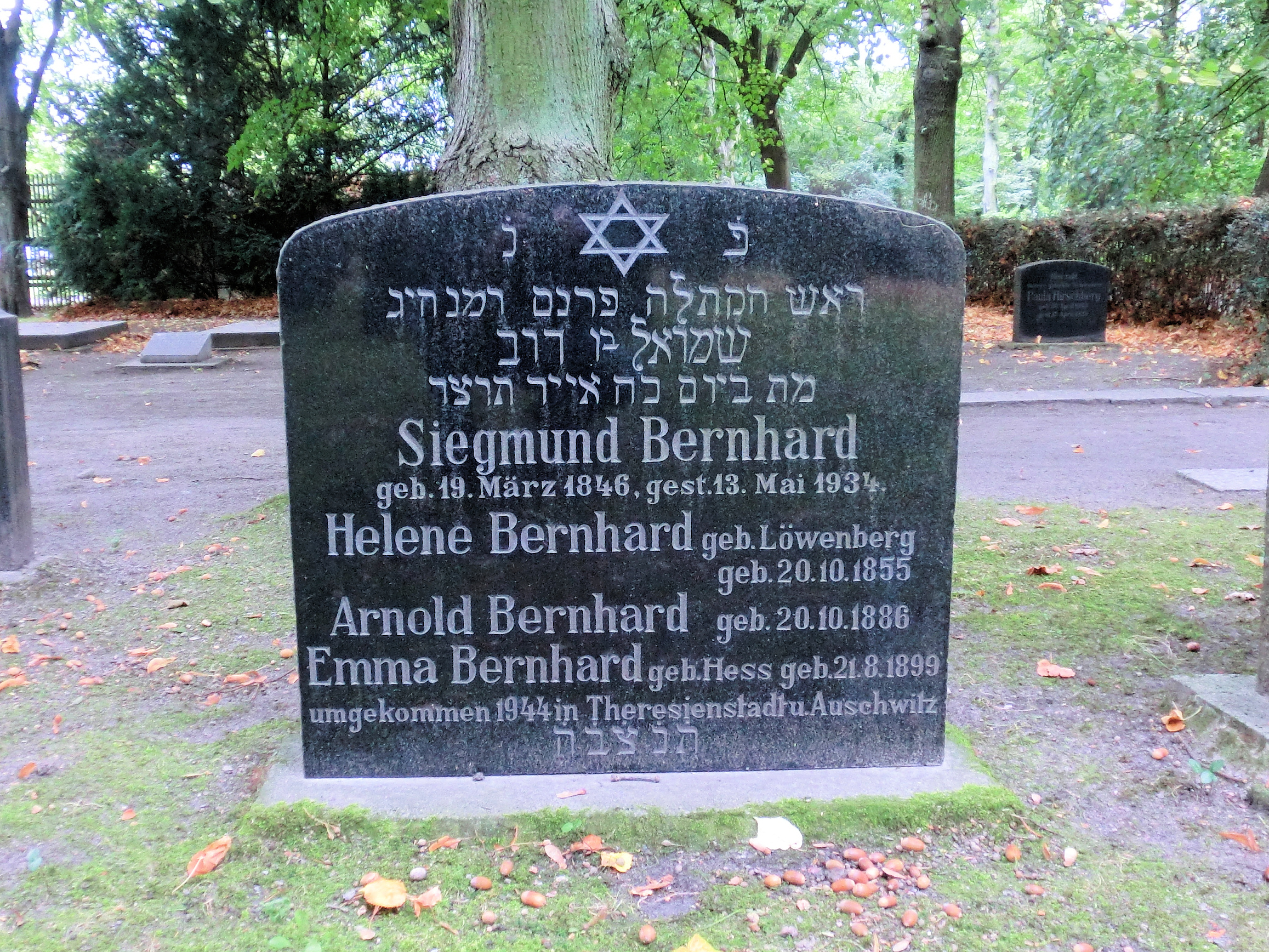 Lindenpark Rostock (ehemaliger Alter Friedhof), Grabstein und Gedenkstein für Arnold Bernhard